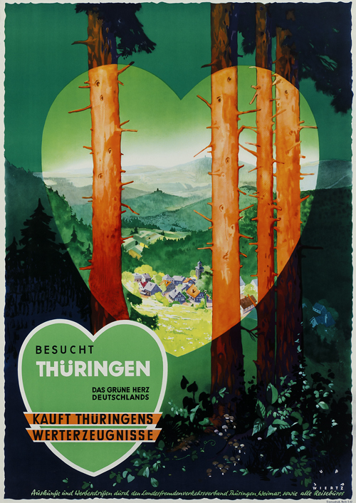 Plakat in den Maßen circa 118,9 x 83,9 cm nach einem Entwurf des Künstlers Jupp Wiertz, um 1937 für den Landesfremdenverkehrsverband Thüringen mit Sitz in Weimar, gedruckt von Erasmusdruck in Berlin. „Besucht Thüringen // Das grüne Herz // Deutschlands // Kauft Thüringens // Werterzeugnisse“ Darunter: „Auskünfte und Werbeschriften durch den Landesfremdenverkehrsverband Thüringen, Weimar, sowie alle Reisebüros“ ...